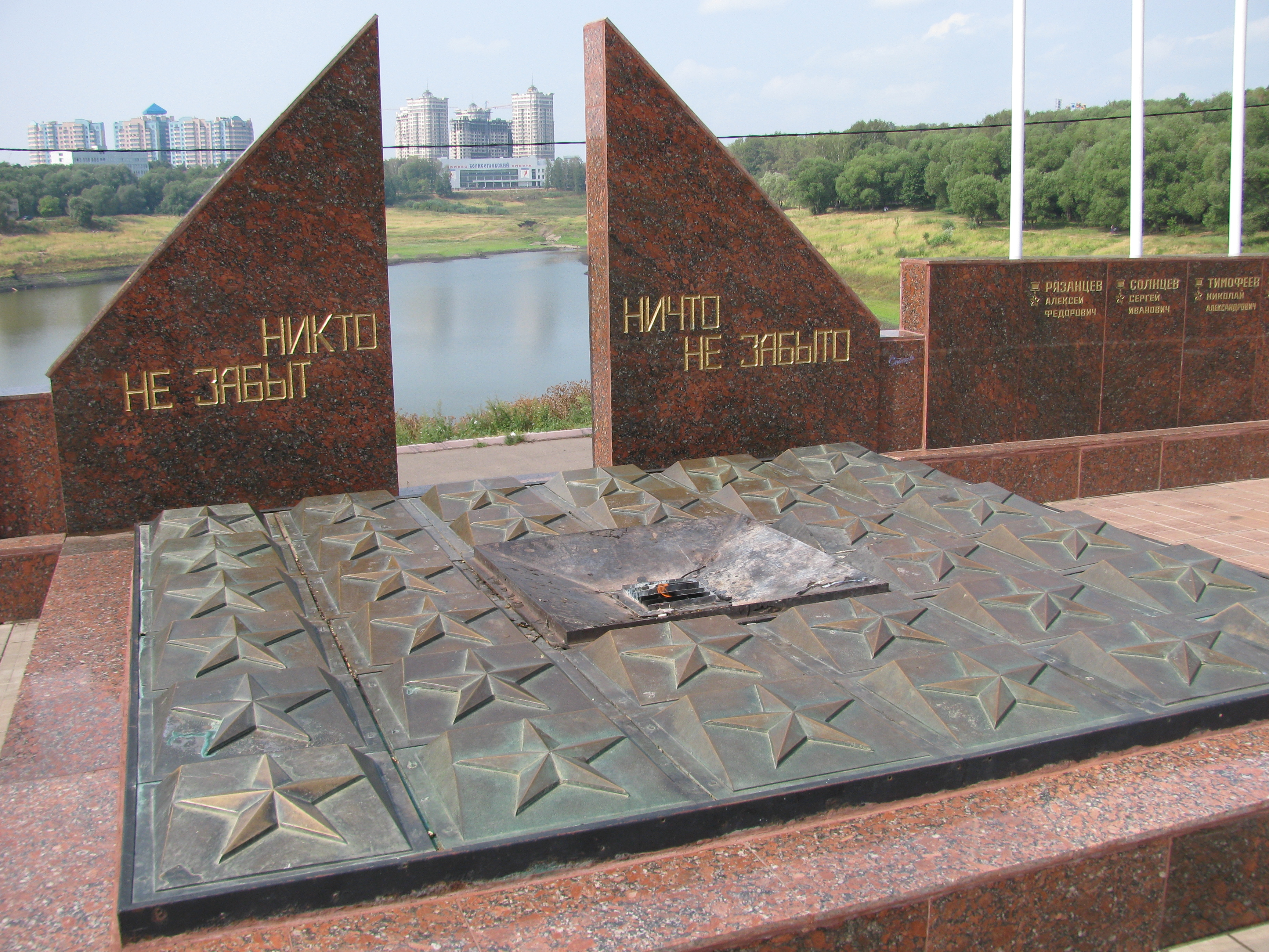 Вечный огонь